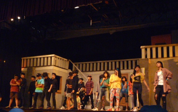 Teater musikal Galau yang dipentaskan di Gedung Kesenian Rumentang Siang Kota Bandung pada tanggal 15 September 2012.